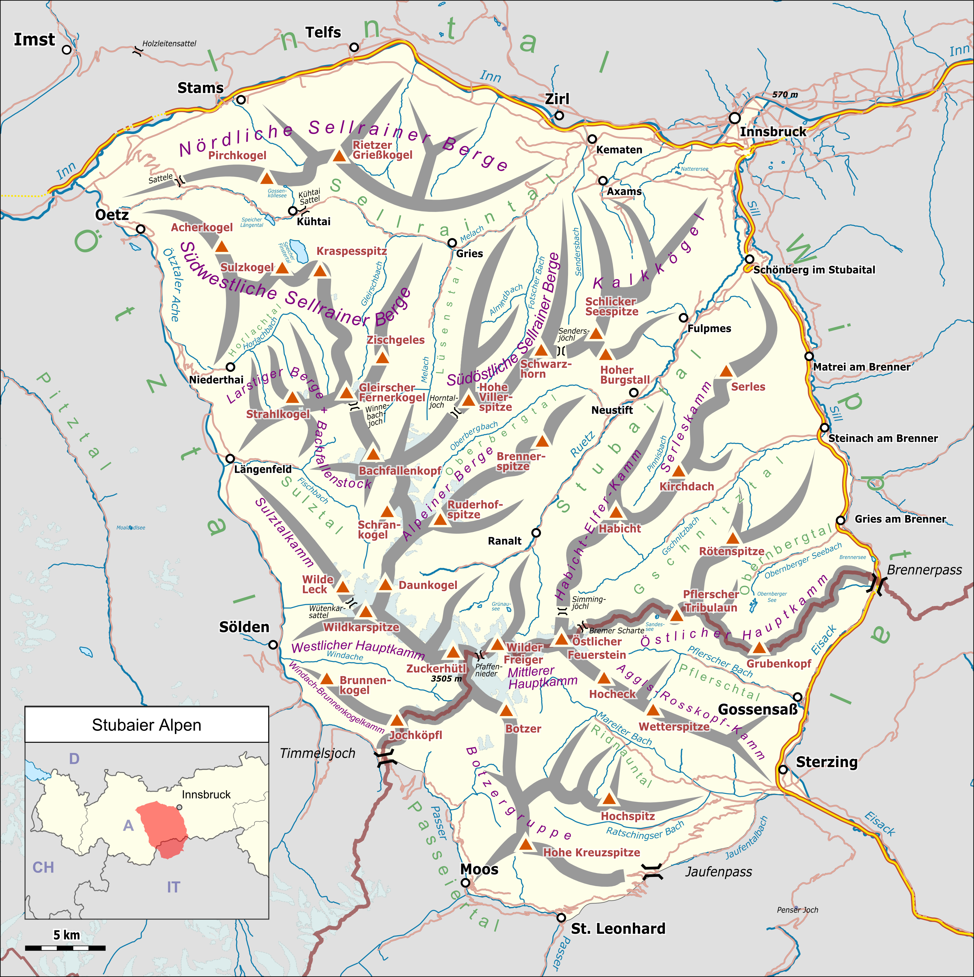 Lagekarte der Stubaier Alpen